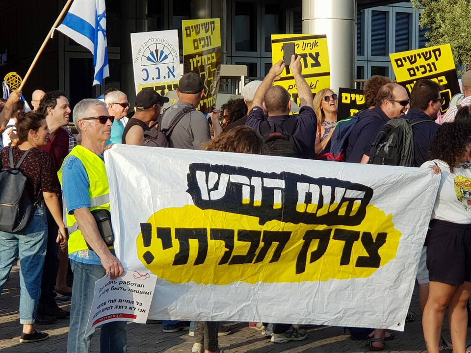 צדק חברתי בהפגנה ב- 31.5.18 בתל אביב, למען זכויות אזרחים ותיקים ואנשים עם מוגבלות.